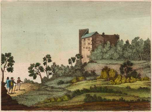 Veduta del castello Habsbourg.